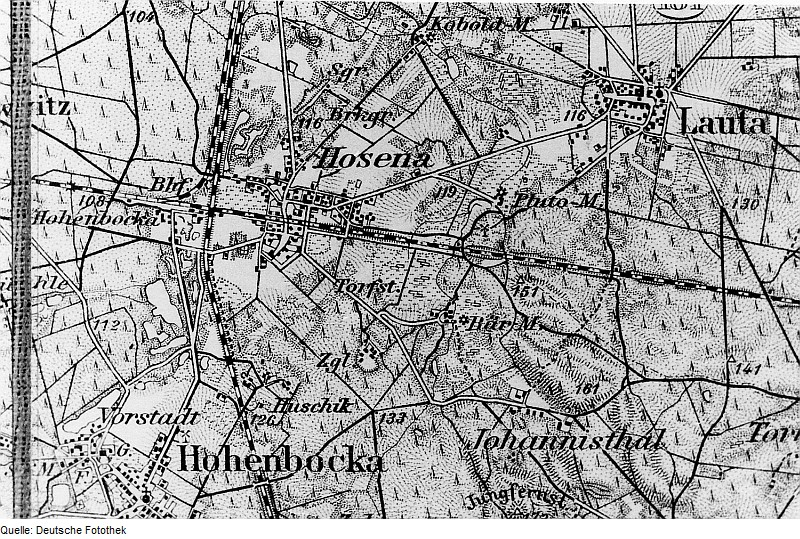 Original image description from the Deutsche Fotothek Senftenberg-Hosena. Karte